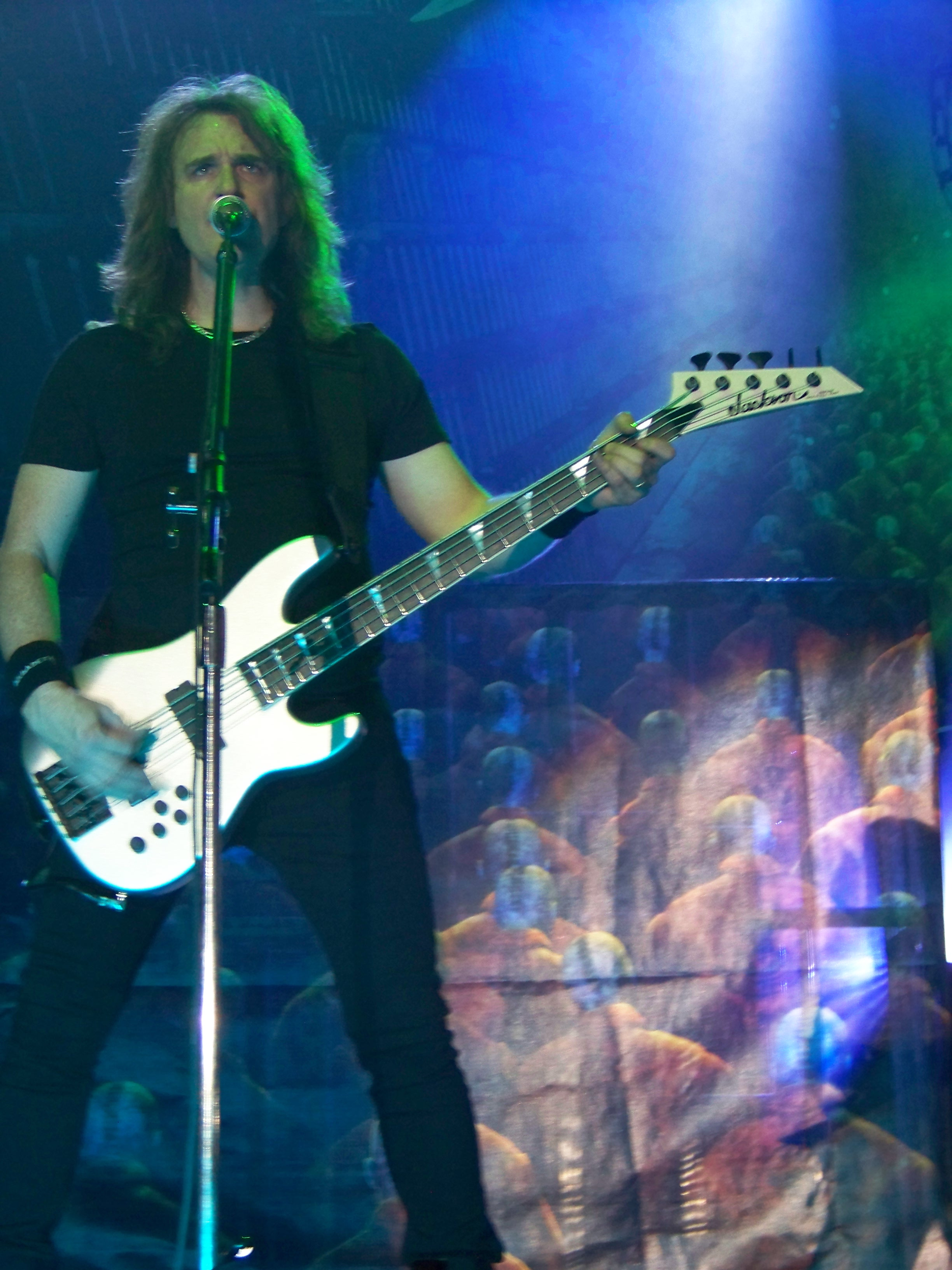 Фото Дэвида Эллефсона из Megadeth. Март 2011, Киев, концерт Megadeth и Slayer.